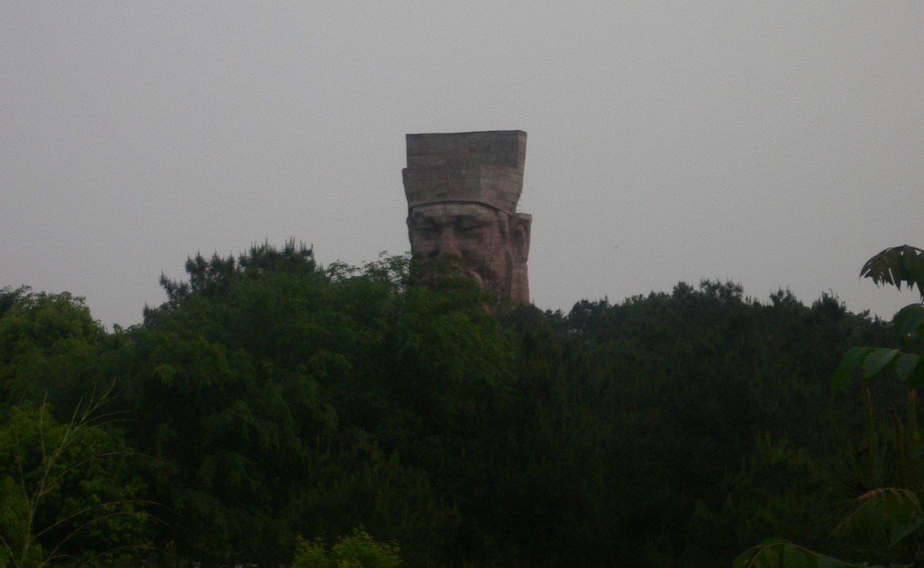 浙江方岩山上胡则巨型雕像